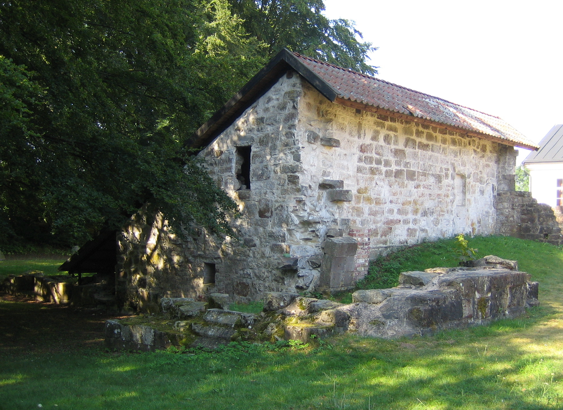 Monastary remains at Herrevads kloster, Sweden